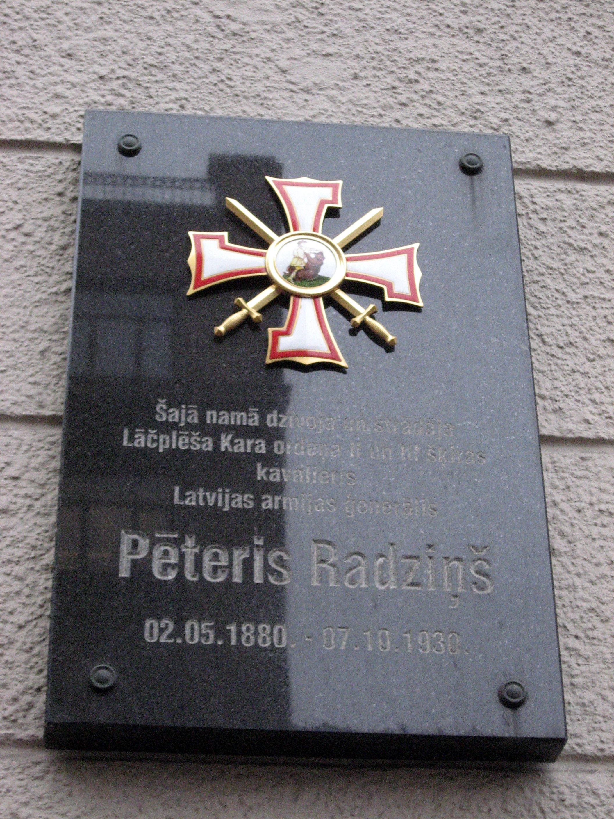 Riga, pamětní deska 1930